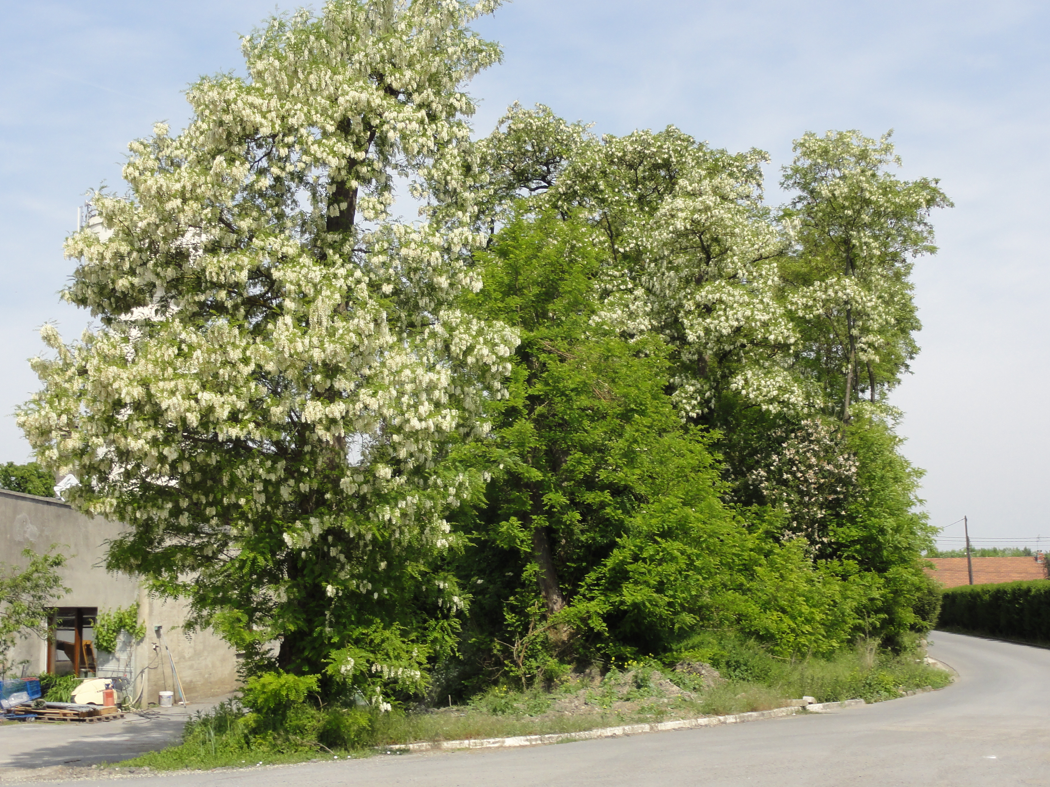 Terril n° 187A dit Davy Nord, Fosse Davy de la Compagnie des mines d'Anzin, La Sentinelle, Nord, Nord-Pas-de-Calais, France.